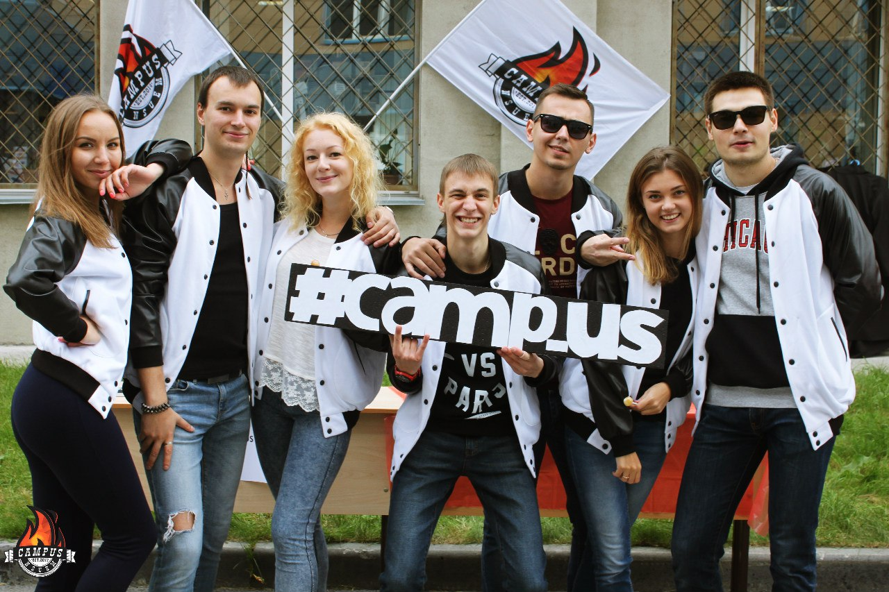 Студенческая организация НГУЭУ CampUs